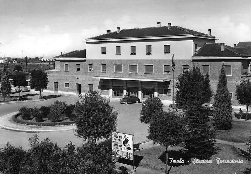 Cartolina della stazione ferroviaria di Imola.